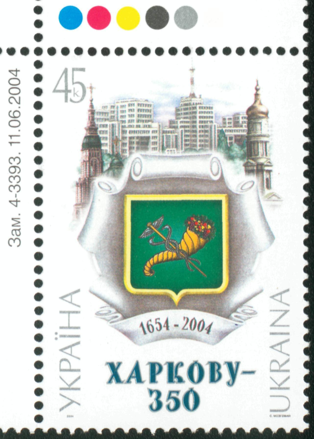 Почтовая марка Украины к 350-летию Харькова с изображением герба города, Благовещенского собора, Госпрома и Успенского собора. Stamp of Ukraine s604, 2004.